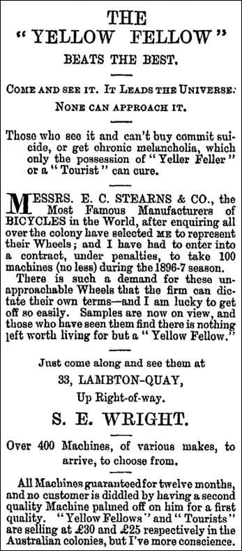 New Zealand Evening Post - Advertisement - 1896